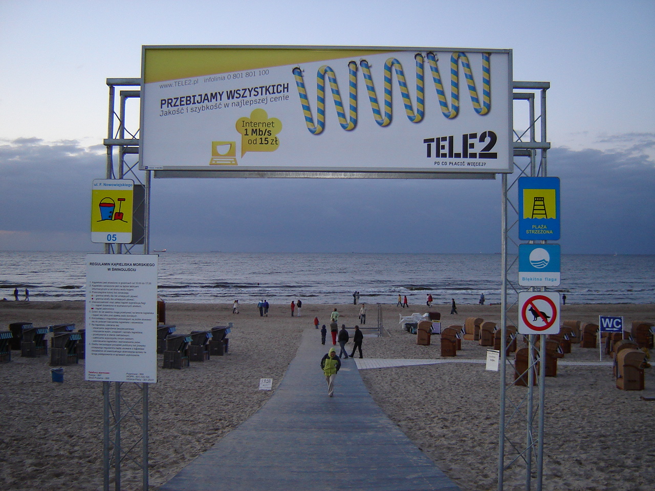 Świnoujście wejście na plażę